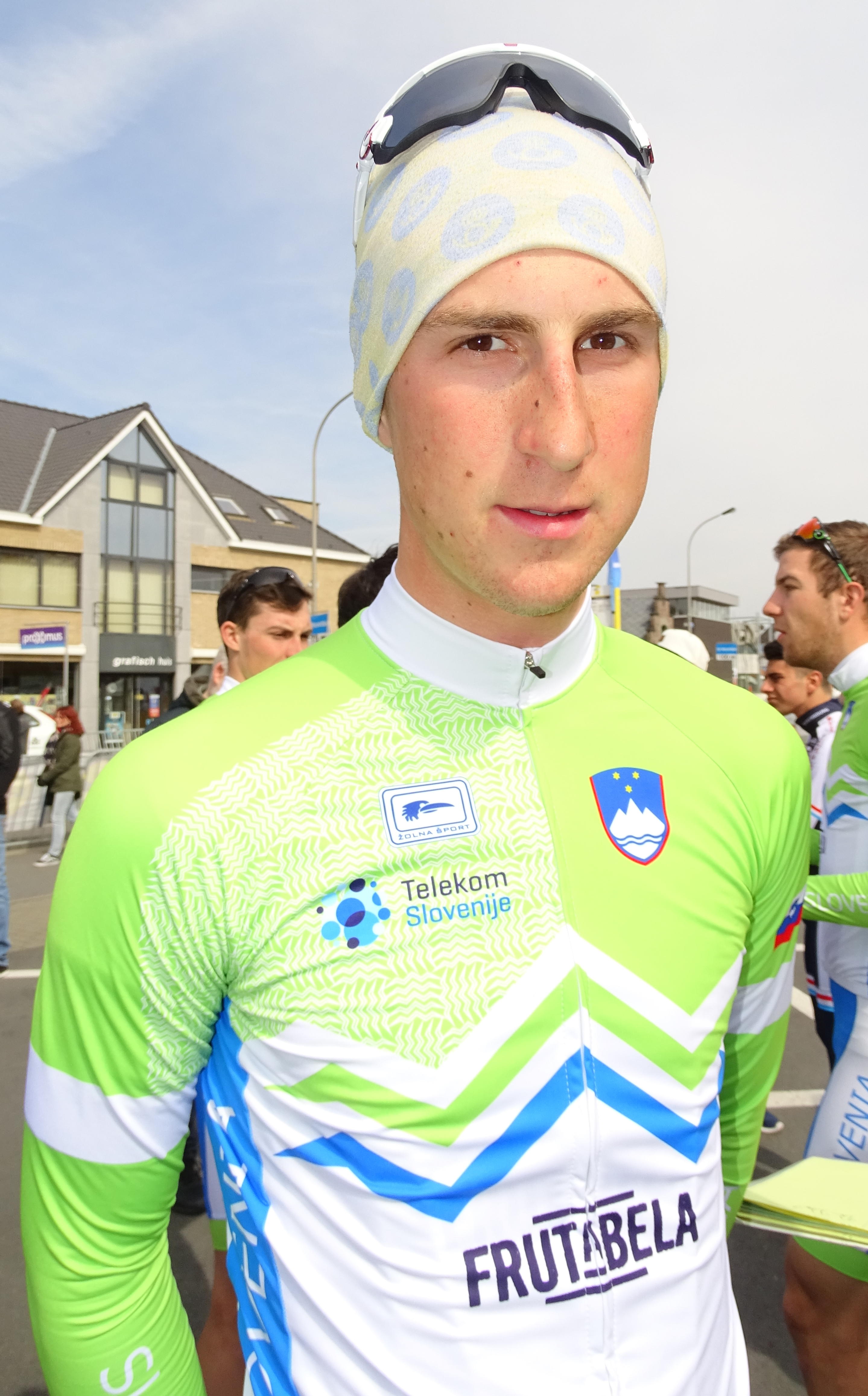 Reportage réalisé le samedi 9 avril à l'occasion du départ et de l'arrivée du Tour des Flandres espoirs 2016 à Audenarde, Belgique.